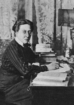 Mathilda Staël von Holstein (1876-1953)